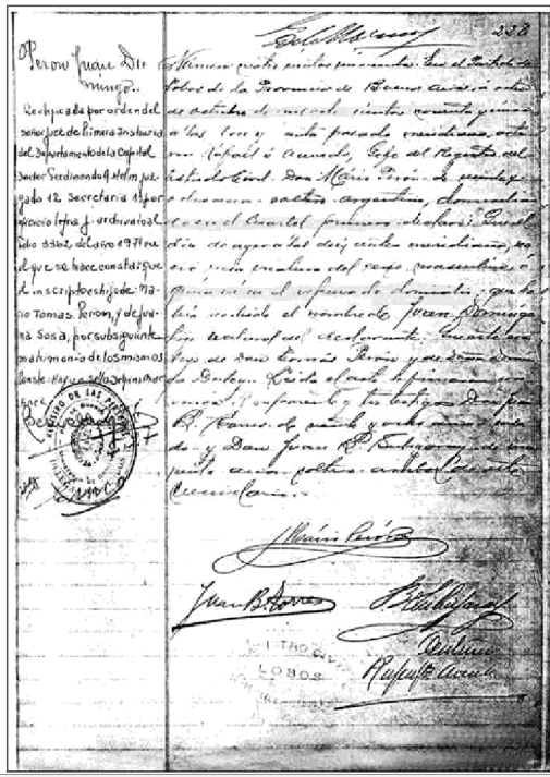 Certificado de nacimiento de Juan Domingo Perón. 8 de octubre de 1895. Número 450, página 228. Registro Civil de Lobos. Provincia de Buenos Aires. Argentina. TEXTO DEL DOCUMENTO Lado derecho: "228" (nº página) "Número cuatrocientos cincuenta. En el Partido de Lobos de la Provincia de Buenos Aires, a ocho de Octubre de mil ochocientos noventa y cinco, a las doce y treinta pasado meridiano, ante mi, Rafael E, Acevedo Jefe de Registro del Estado Civil, Don Mario Perón de veinte y ocho años, soltero, argentino, domiciliado en el Cuartel Primero declara: Que el día de ayer a las diez ante meridiano, nació una criatura del sexo masculino, a quien ví en el expresado domicilio, que había recibido el nombre de Juan Domingo, hijo natural del declarante. Que este era hijo de Don Tomás Perón y de doña Dominga Dutey. Leída el acta la firmaron con migo el exponente y los testigos Don Juan B. Torres de veinte ocho años, casado, y Don Juan B. Subigaray de cuarenta años, soltero, ambos de este vecindario." Margen izquierdo: "Perón Juan Domingo. Rectificada por orden del señor Juez de Primera Instancia del Departamento de la Capital Doctor Ferdinando A. Helm juzgado 12 Secretaría 13 por oficio archivado al folio 3362 del año 1974 en el que se hace constar que el inscripto es hijo de Mario Tomás Perón y de Juana Sosa, post subsiguiente matrimonio de los mismos. Conste." (hay un sello) "Delfina Martínez".